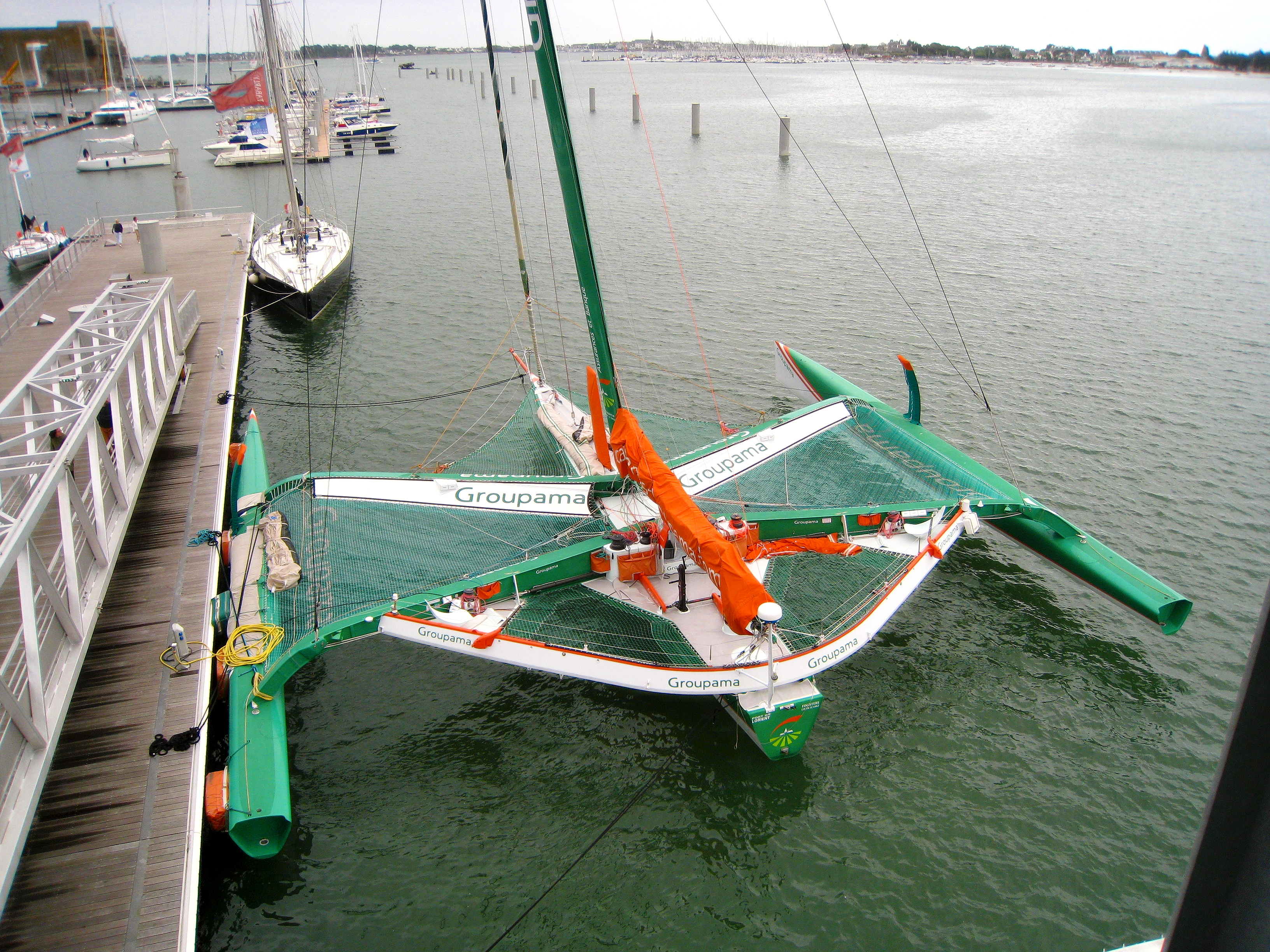 der Trimaran Groupama 2; die Jacht mit schwarzem Rumpf dahinter ist die Pen Duick V